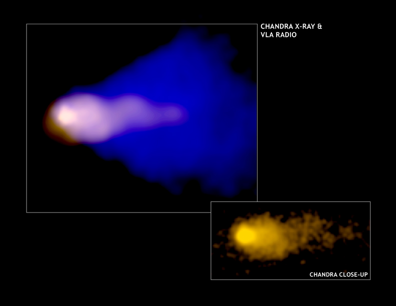 Pulsar G359.23-0.82 (Mouse)Pulsar G359.23-0.82 (Mouse) combined Radio & X-Ray image